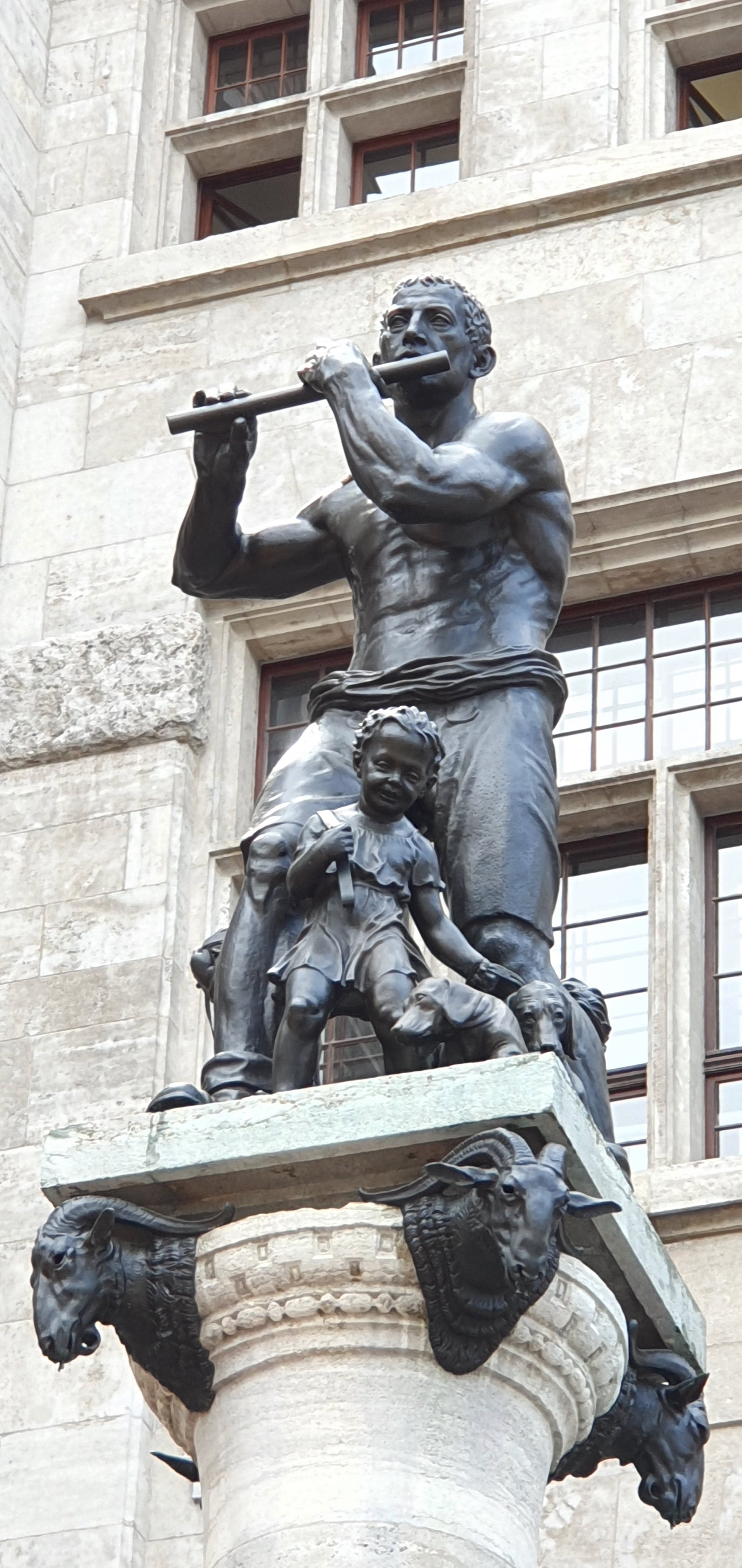 Rathausbrunnen (Leipzig)